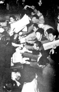 中文（台灣）: 民眾搶購報導邱宅血案的《大公報》